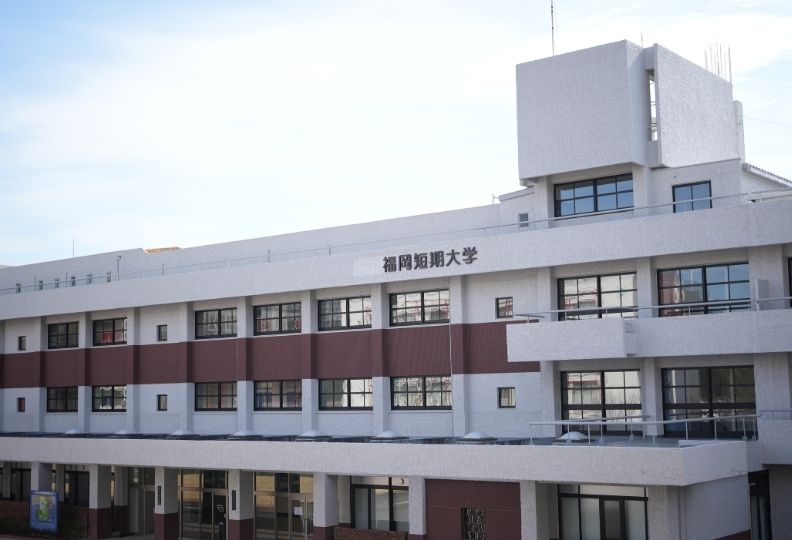 福化女子短期大学1号館外観です。